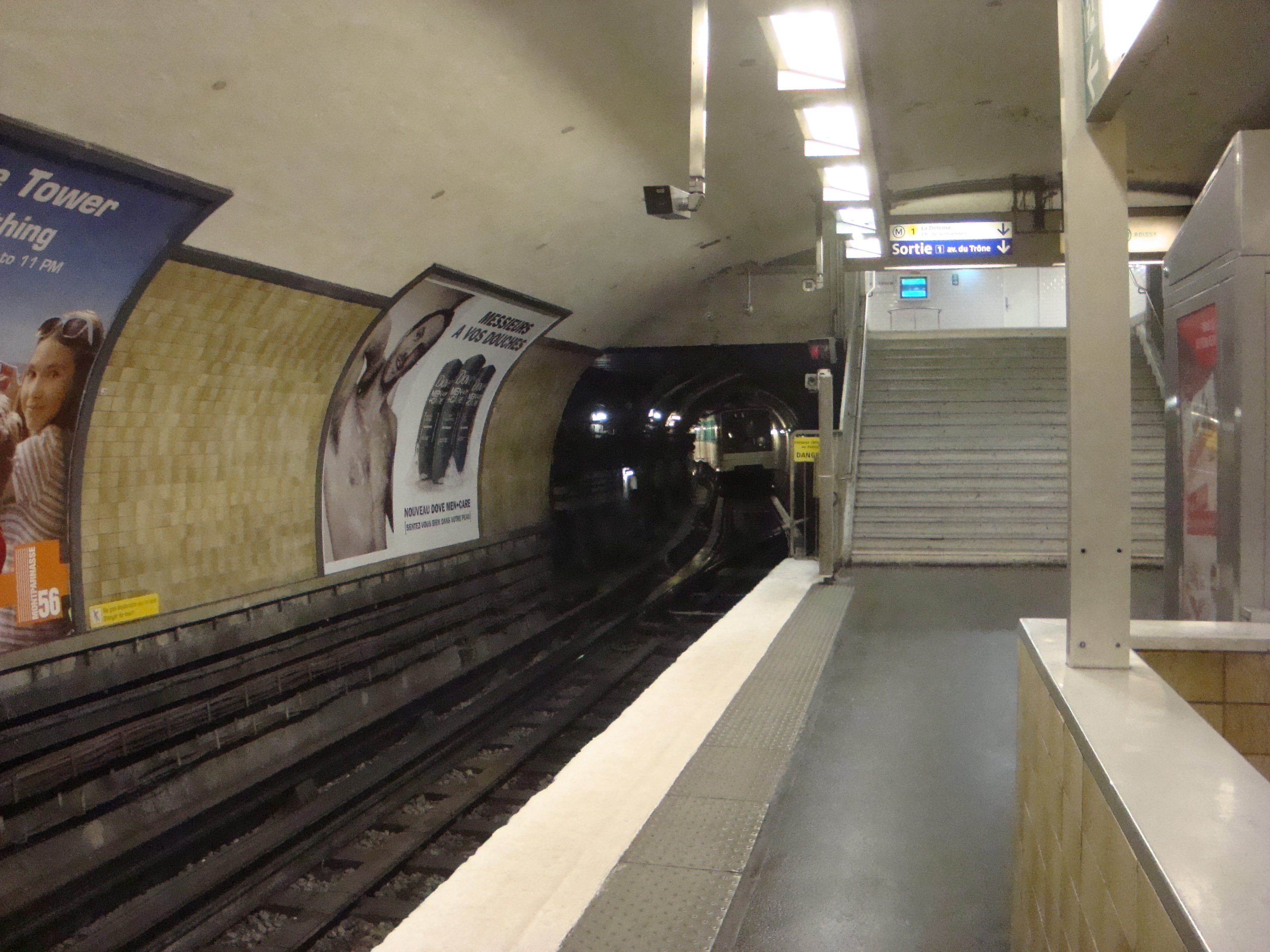 Une rame stationnée à proximité des quais de la station Nation sur la ligne 6 du métro parisien.